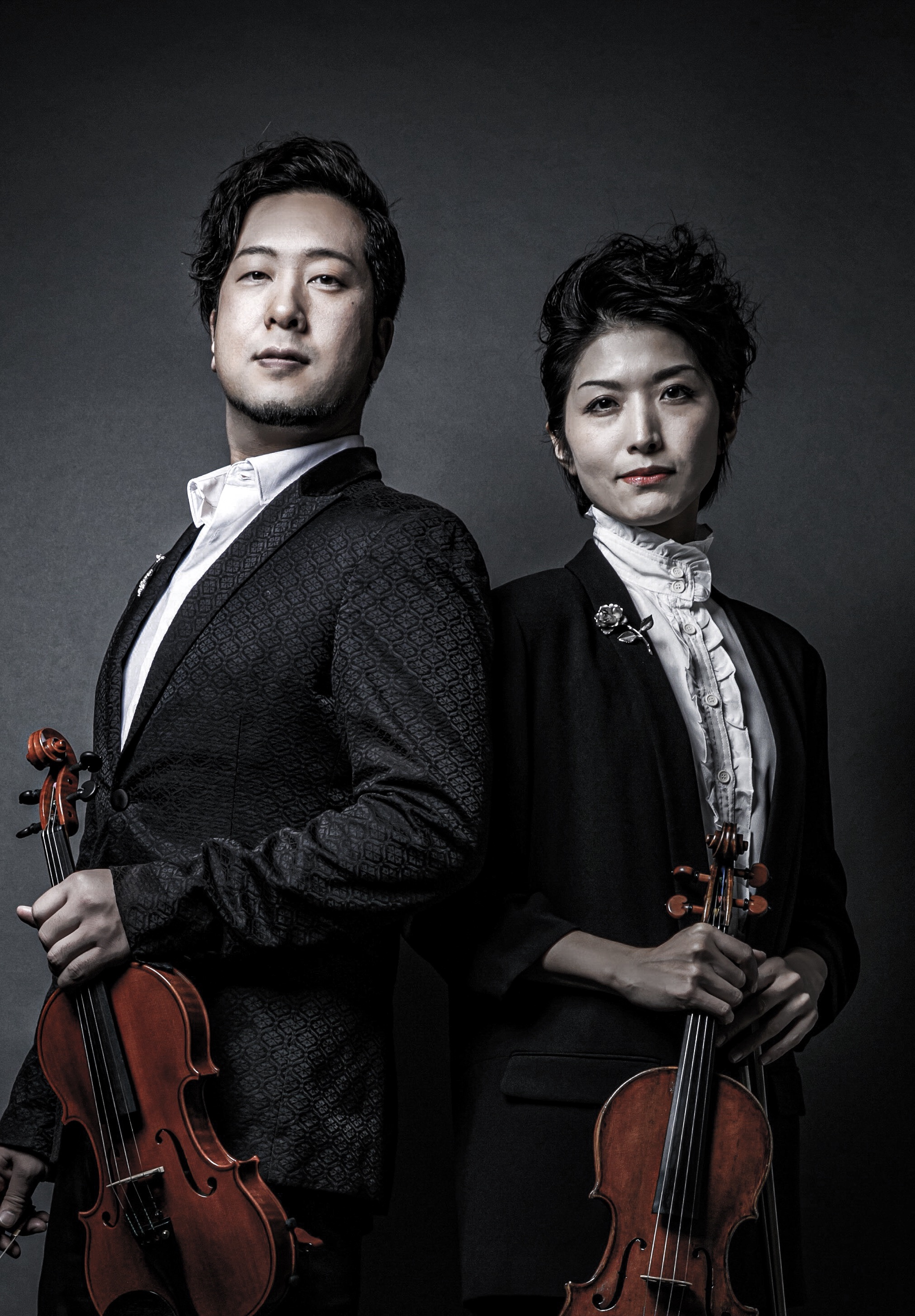 2019年5月３日にヴァイオリニスト山内達哉とfumikoがスタジオで撮影